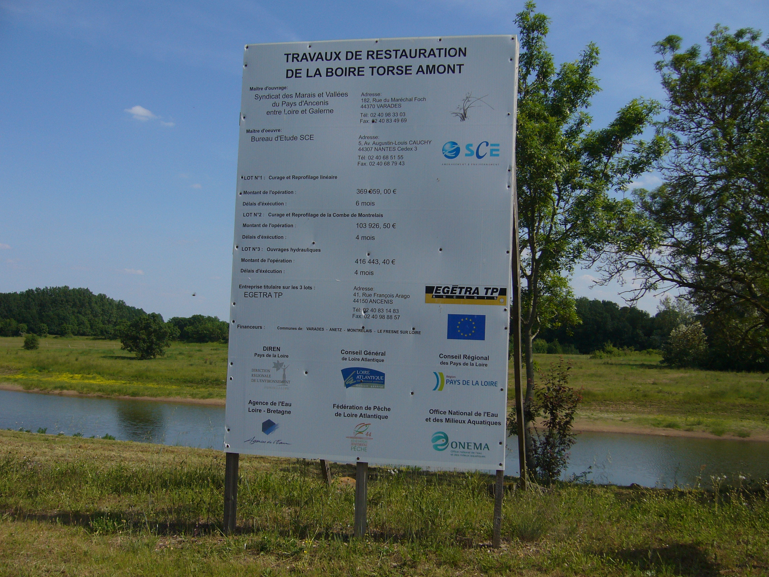 Travaux de restauration de la boire Torse, ancien bras de la Loire, entre Montrelais et Varades.